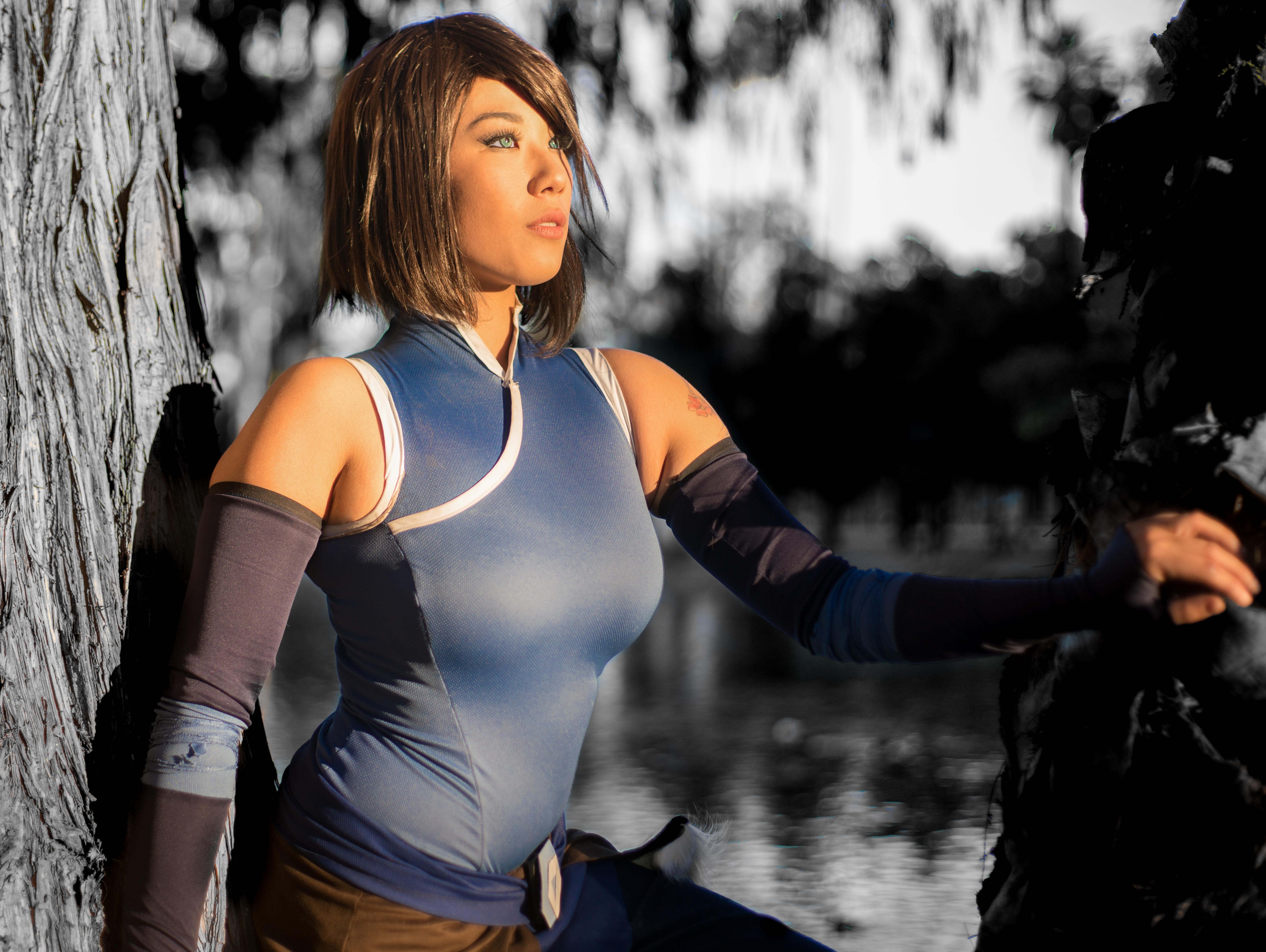 Korra